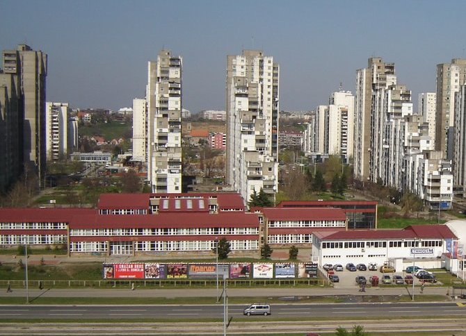 Osnovna Škola Knjeginja Milica, Novi Beograd